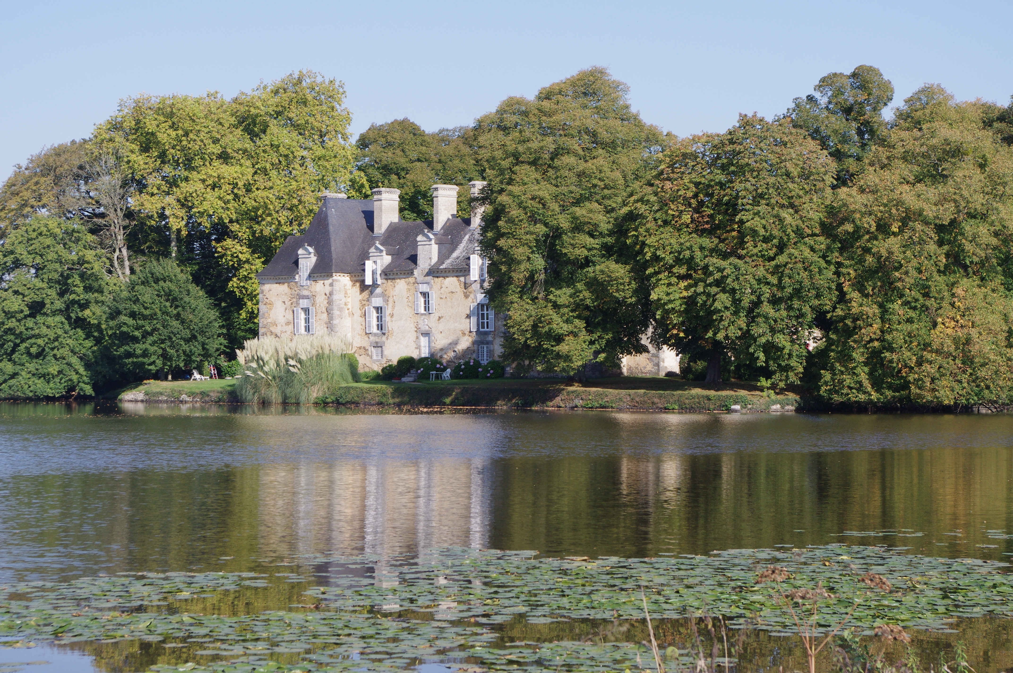 Chateau de Perronay, Romillé